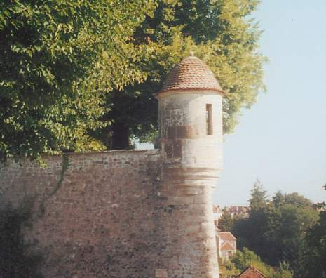 Date : fr:10 août 2003 Source : personal photo of archeos Description : Bartizans from the fortifications of the village Avalon in France. Échauguette des fortifications de la ville d'Avallon dans l'Yonne (localisation incertaine pour ce qui est de la ville, le département est sur). Licence